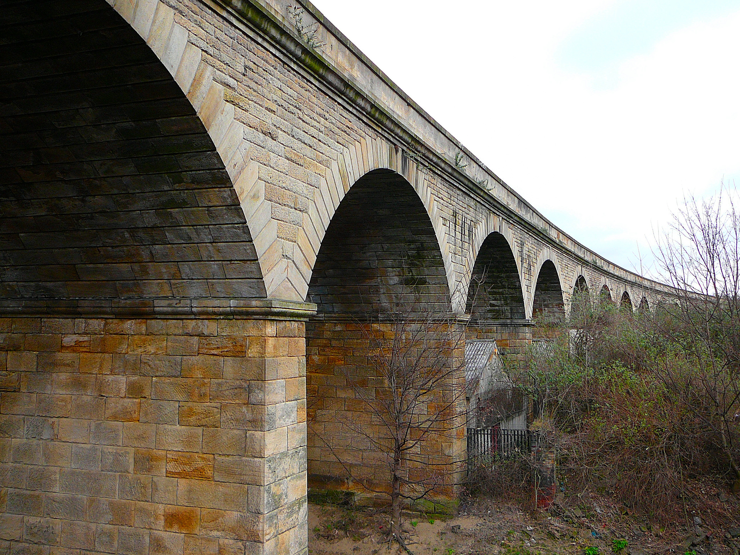 Kirkstall Viaduct 1